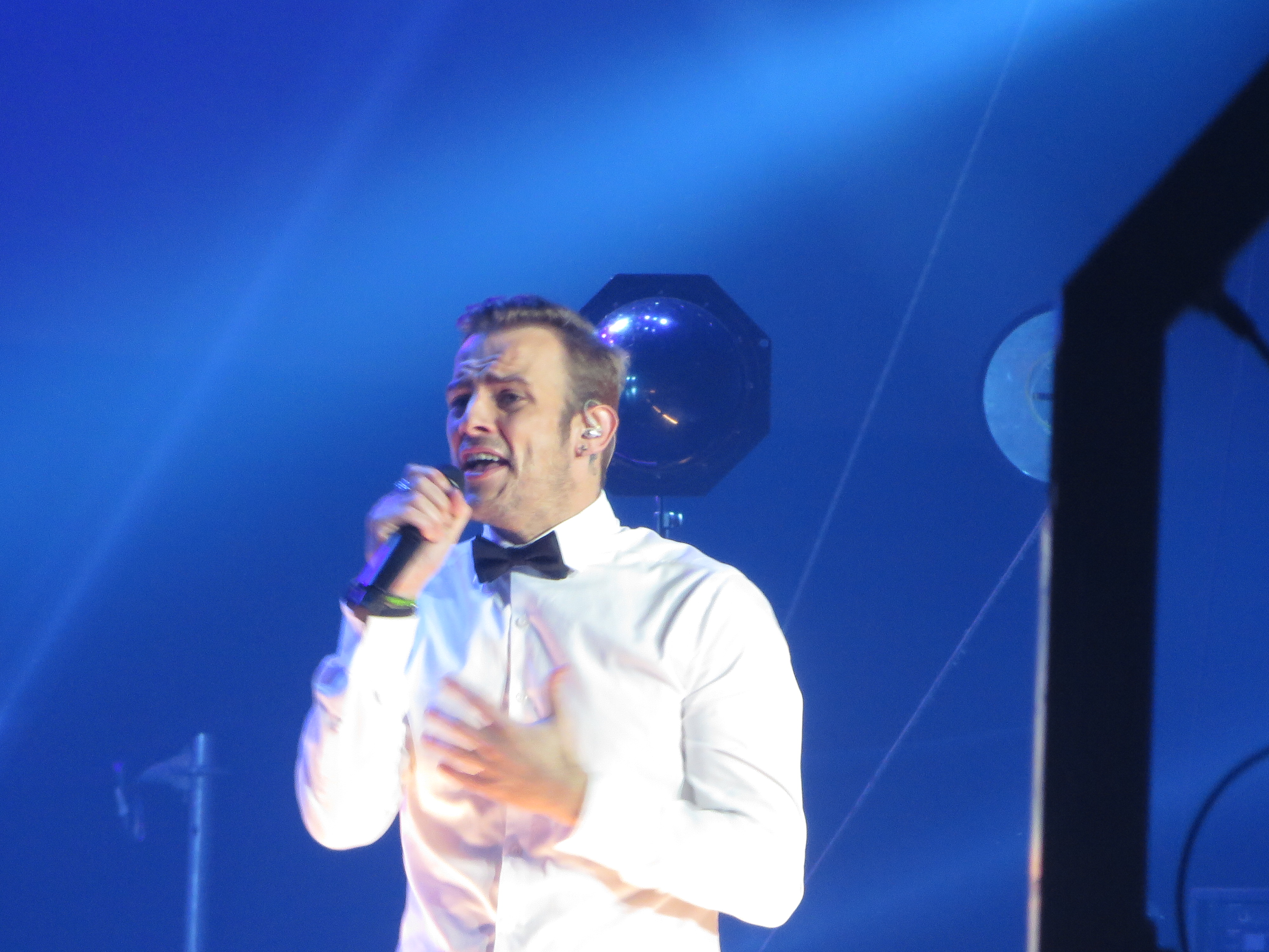 Actuación de Alex (Àlex Casademunt González) en el concierto conmemorativo del 15 aniversario de OT (Operación Triunfo) en el Palau Sant Jordi de Barcelona (31-10-2016).